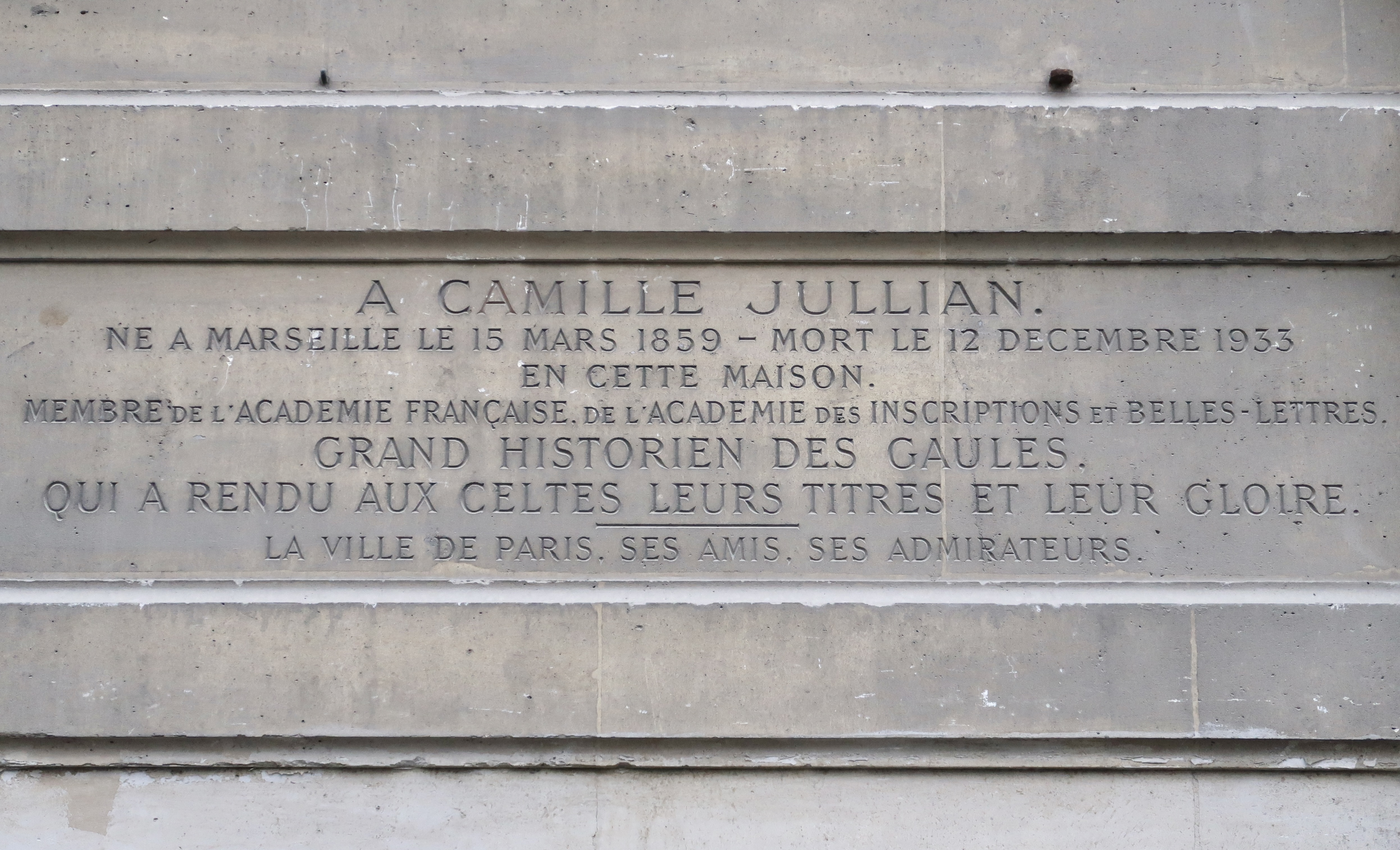 Inscription en hommage à Camille Jullian, 30 rue Guynemer (Paris, 6e).